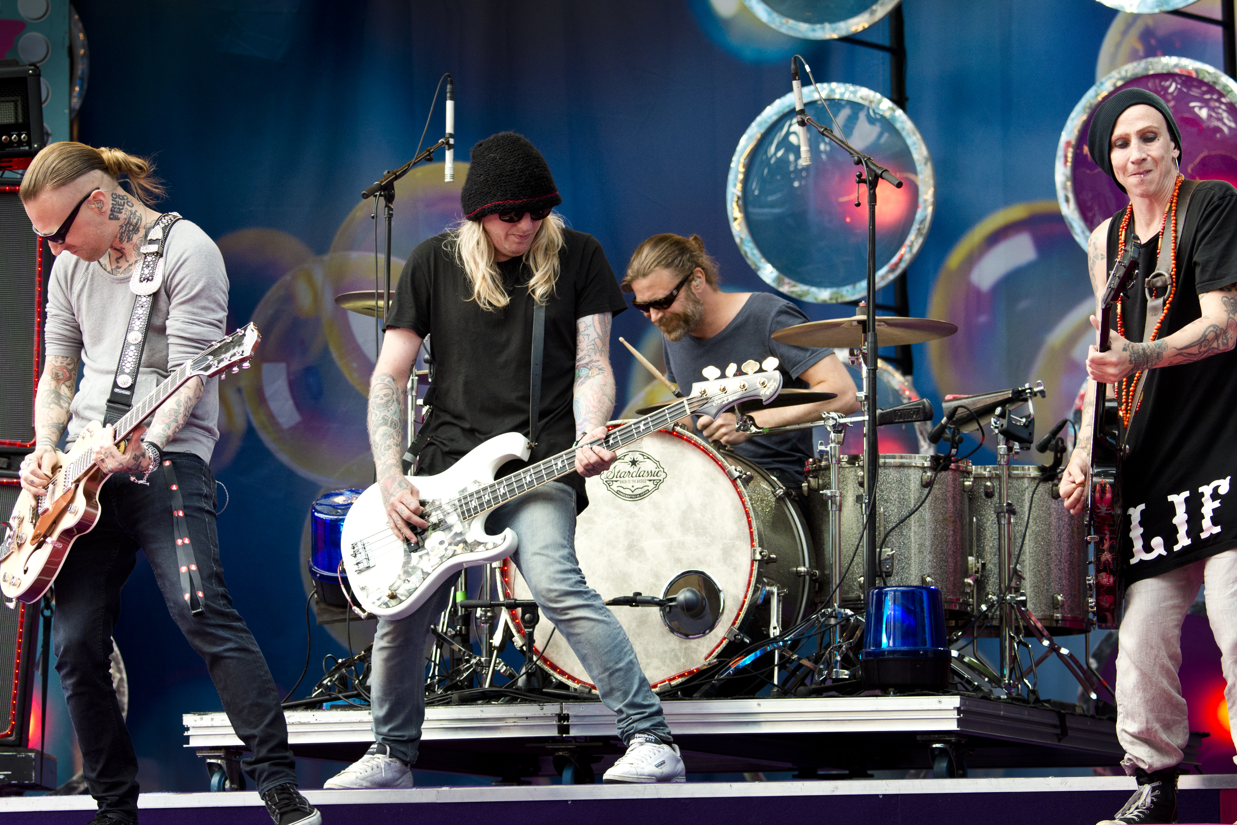 Backyard Babies på Sommarkrysset i Stockholm på Gröna Lund 2015